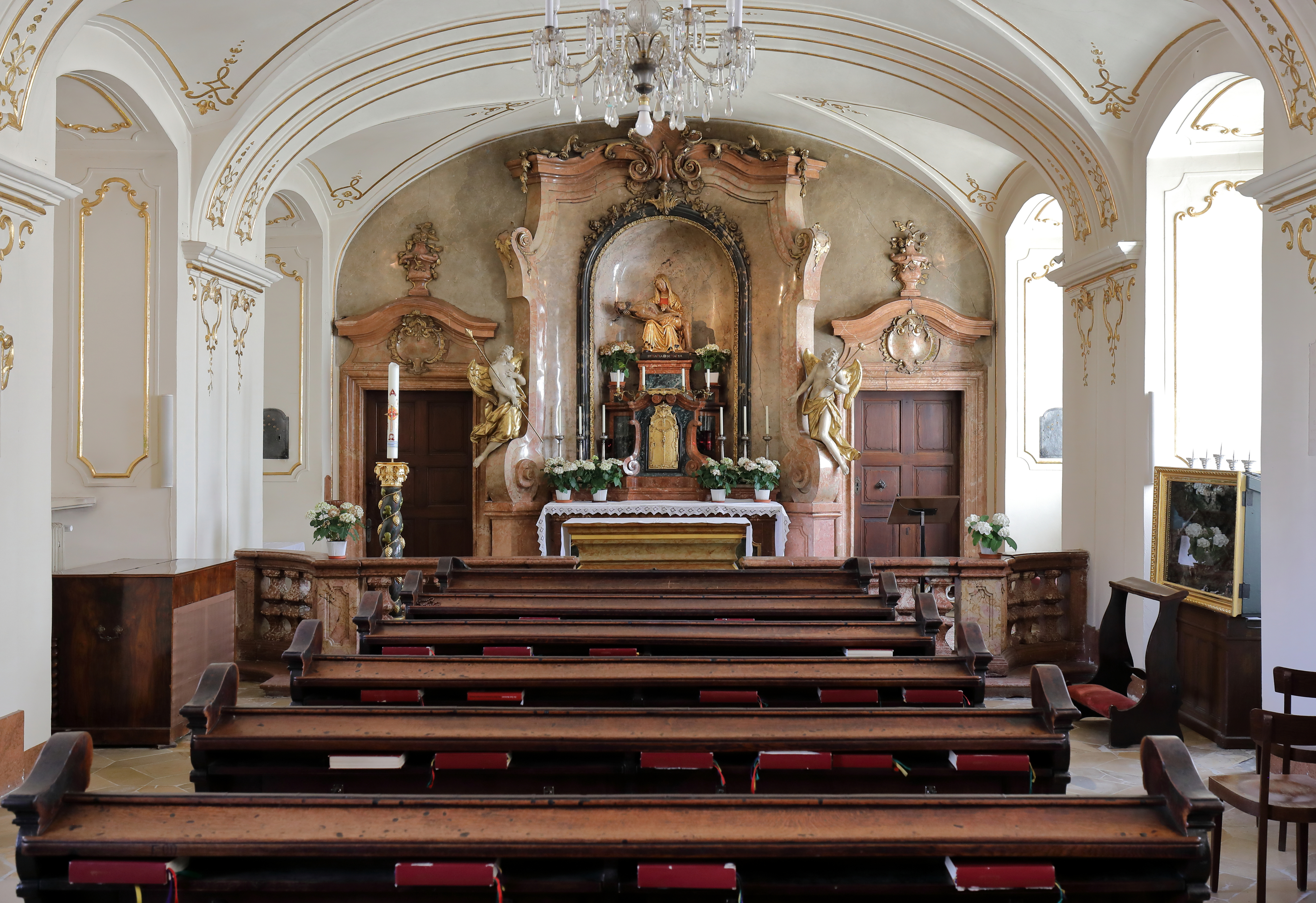 Die Schmerzenskapelle linksseitig der Piaristenkirche Maria Treu am Jodok-Fink-Platz im 8. Wiener Gemeindebezirk Josefstadt. Nachdem die Piaristen 1697 in Wien ansässig geworden waren, wurde im Zuge des Klosterbaues auch die Schmerzenskapelle errichtet. Die Grundsteinlegung am 2. September 1698 erfolgte durch Kaiser Leopold I. und ausgeführt wurde der Bau vom Maurermeister Simon Andreas Karafee (Carove) mit seinem Polier Donatus d'Allio.